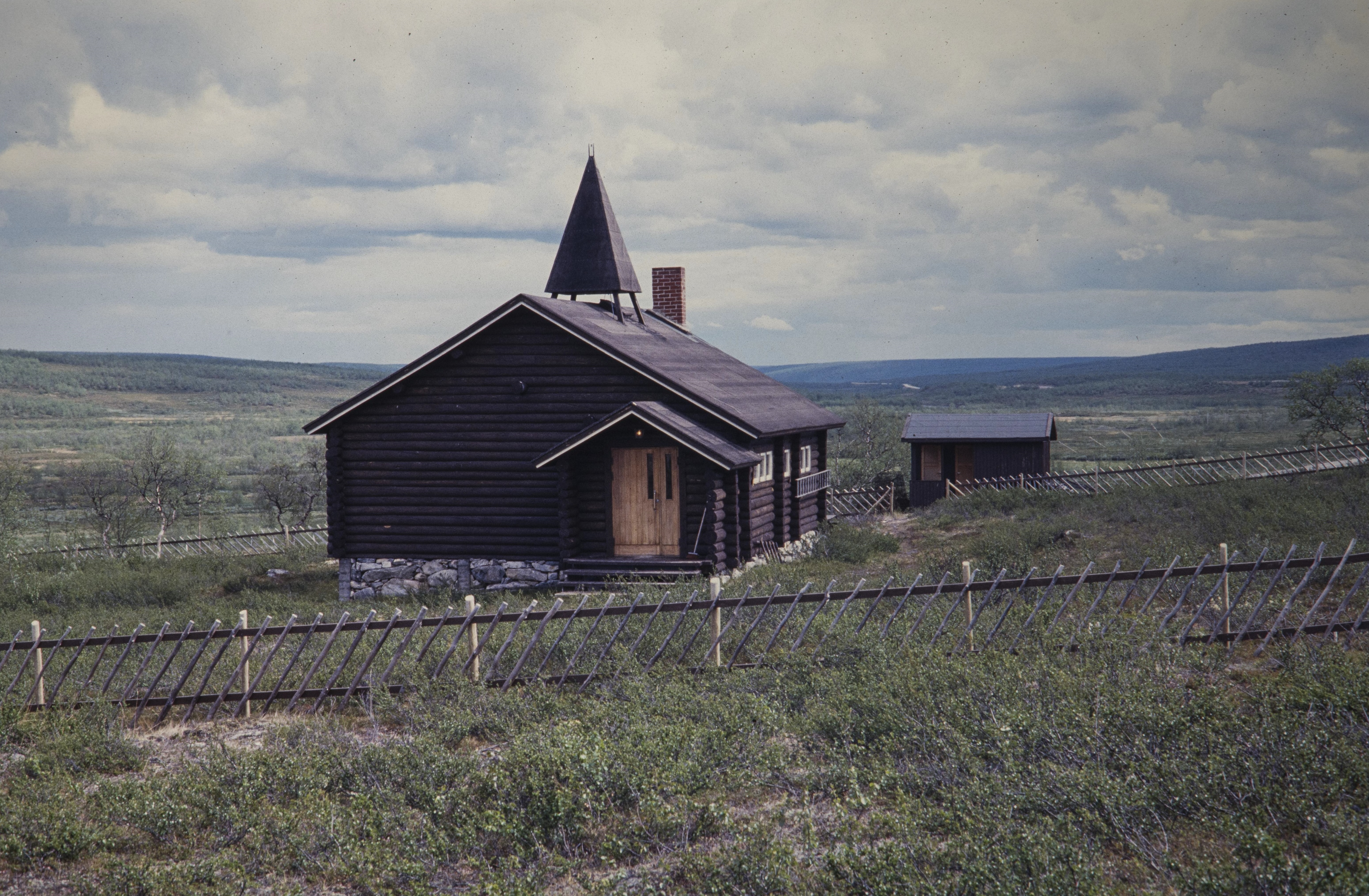 Suosjavrre kapell. Foto: Magnus Berg/Riksantikvaren. Fra Kulturminnebilder.no.